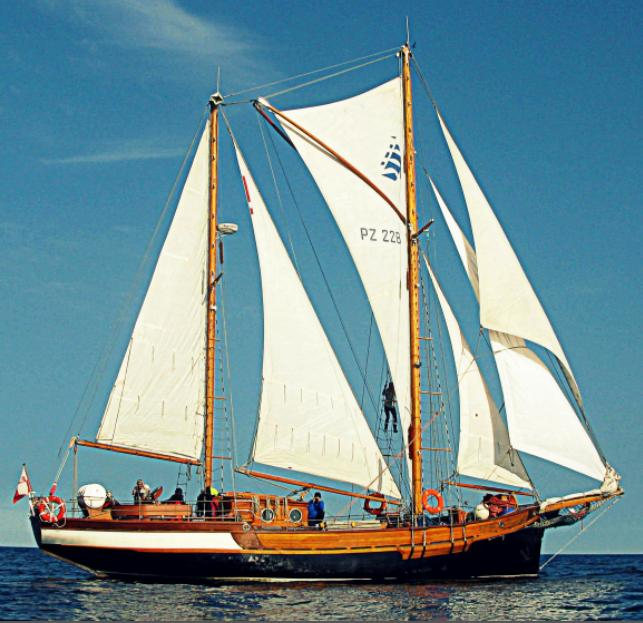 w trakcie wyprawy Odyseja Norweska 2014